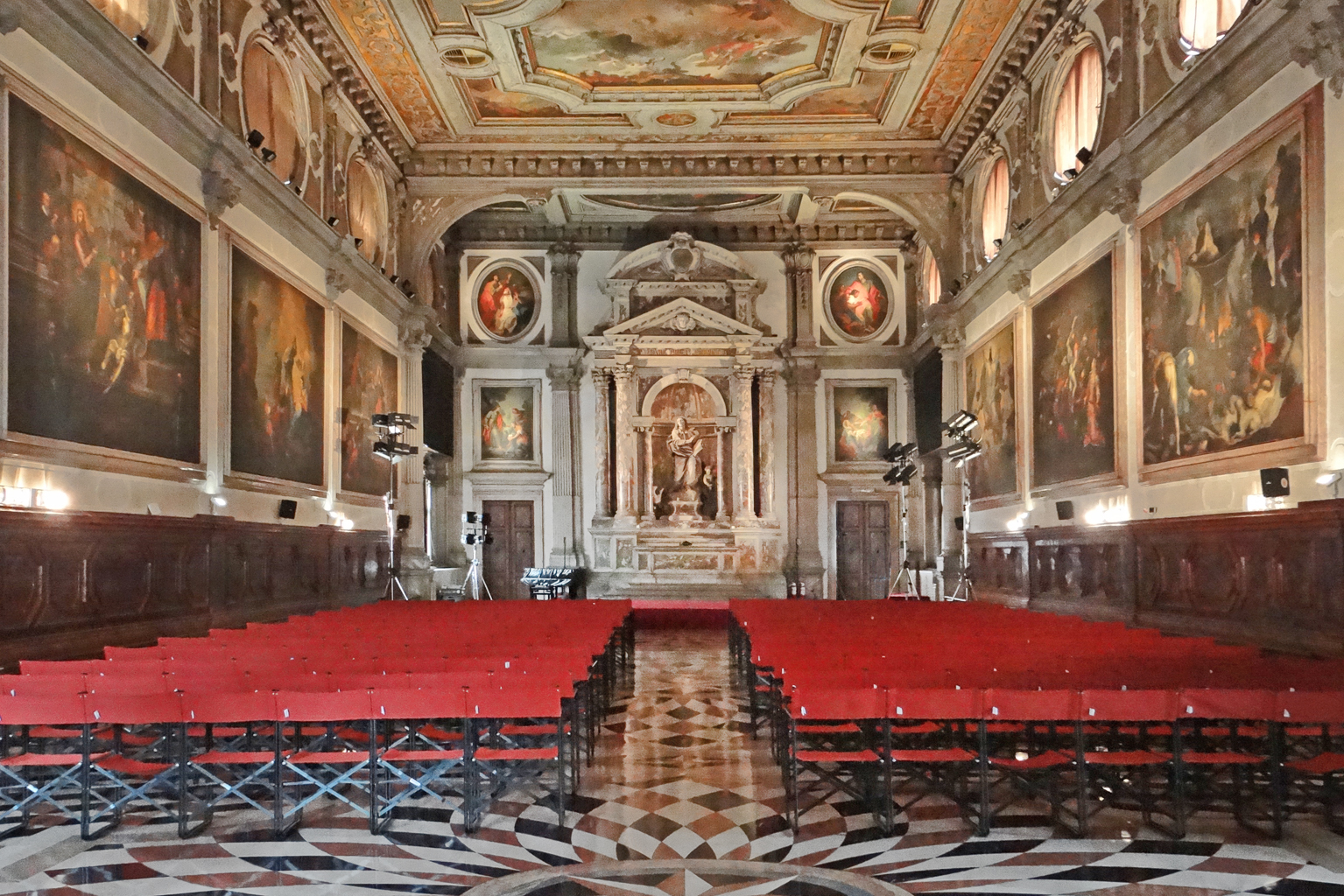 La salle capitulaire de la Scuola Grande San Giovanni Evangelista (Grande École de Saint Jean l'Evangéliste) San Polo, Venezia Cette Scuola, fondée en 1261, est la plus ancienne de celles qui existent encore de nos jours. Cette salle, destinée à accueillir les assemblées générales de la confrérie (scuola), a été conçue sous la direction de Giorgo Massari de 1727 à 1762.. Elle est utilisée aujourd'hui par la fondation Bru-Zane toute proche pour organiser des concerts de musique classique. Au fond de la salle, l'autel dédié au Saint titulaire, dessiné par Massari en 1728 et construit en marbres clairs avec des veines grises. Au centre, dans la niche, la statue de Saint Jean l'Evangéliste par Jean-Marie Morlaiter (1732-1733), en train d'écrire son Évangile, avec un aigle et un ange, symbole de son inspiration divine. Les tableaux au mur racontent les épisodes de la vie du Saint. D'autres peintures, représentent des scènes tirées du livre de l'Apocalypse.